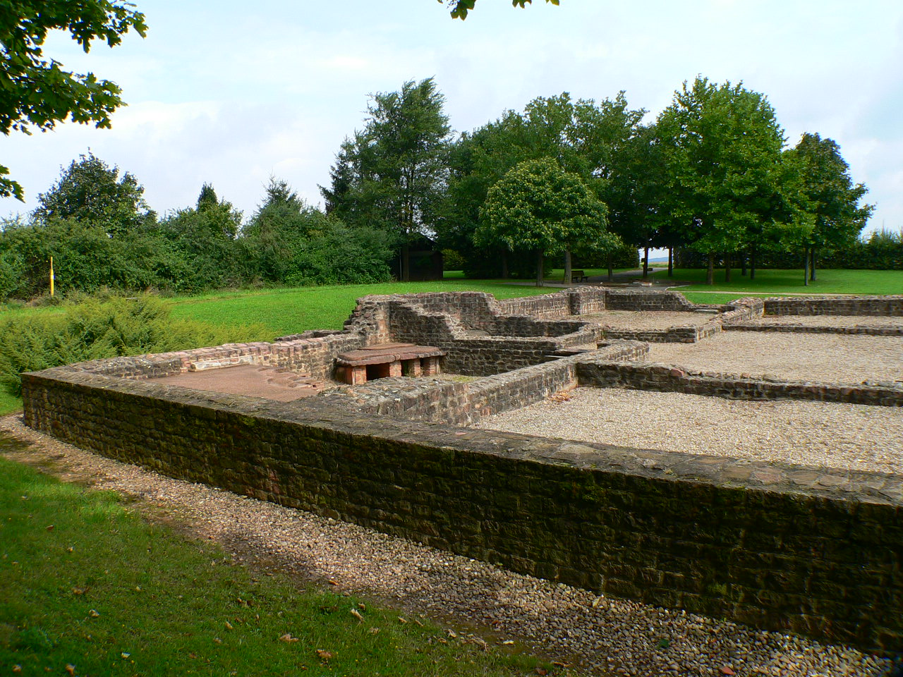 Römische Villa Haselburg im Odenwald, Hessen, Herrenhaus-Fundamente